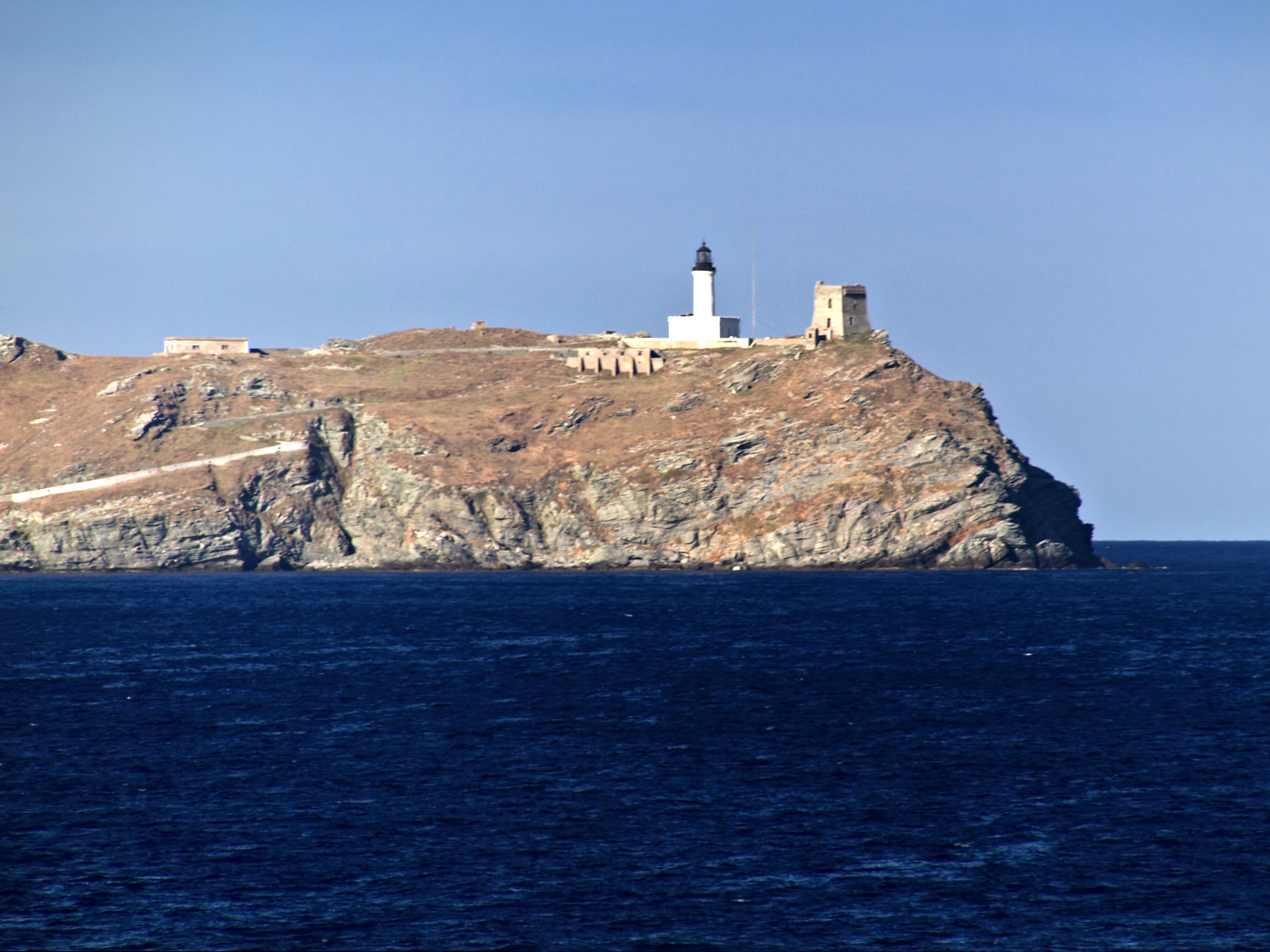 Ersa (Corse) - Phare et tour génoise de l'île de la Giraglia